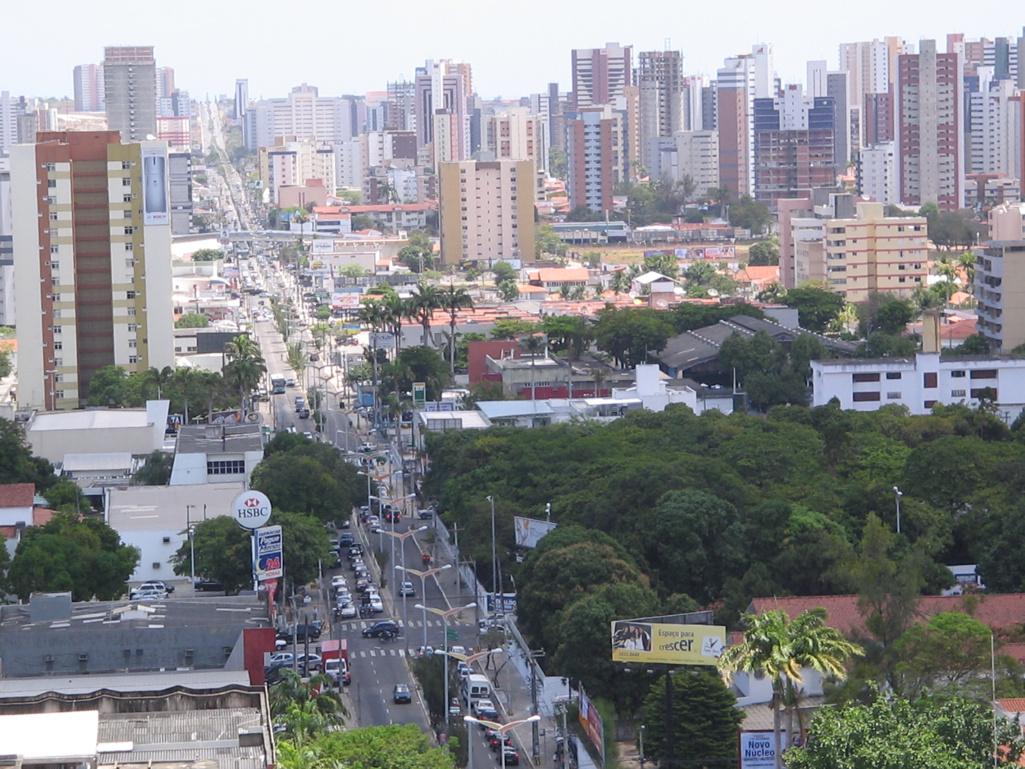 Fortaleza vista da Torre Deo Passeo